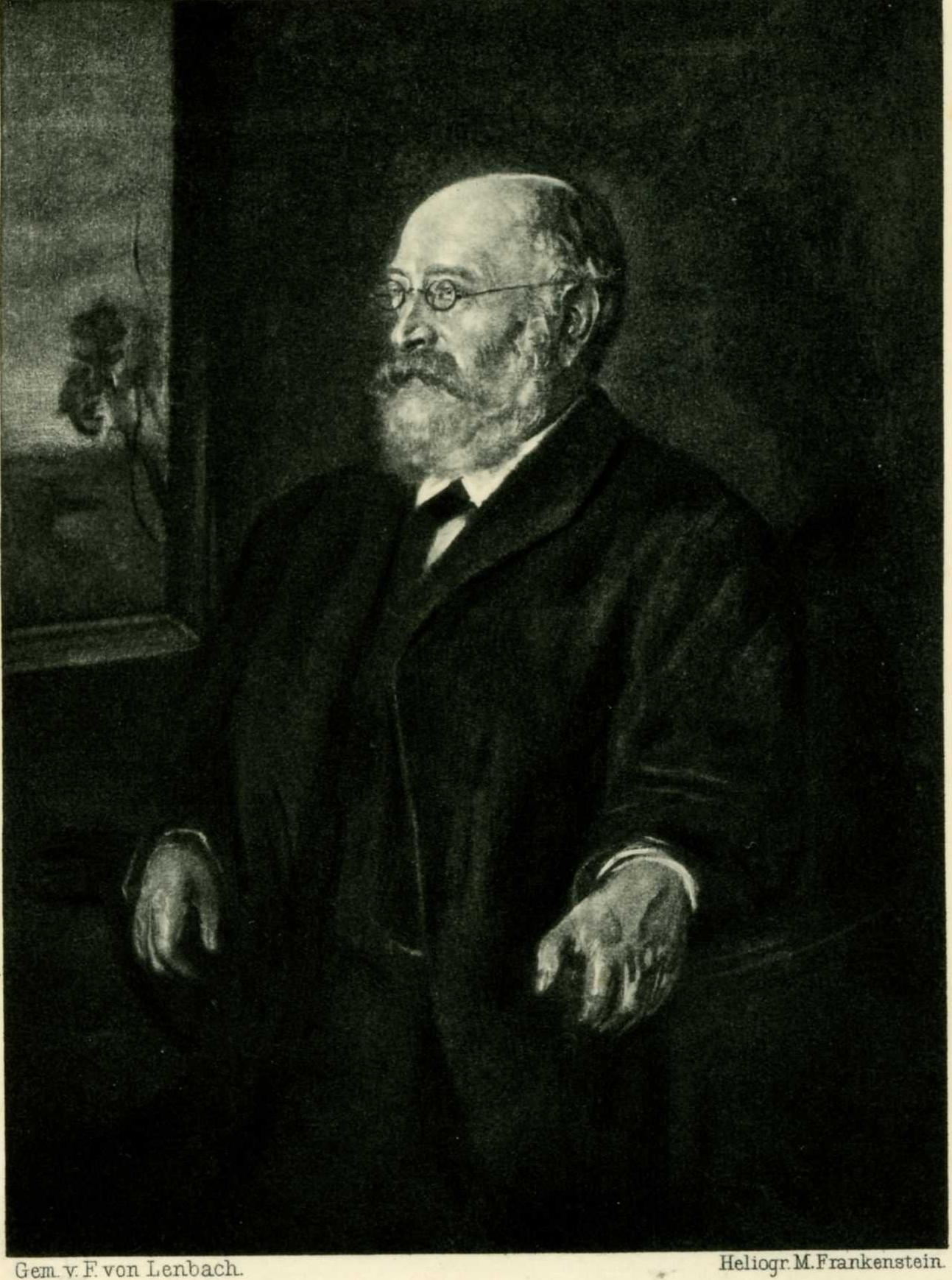 Porträt von Theodor Gomperz, gemalt von Franz von Lenbach